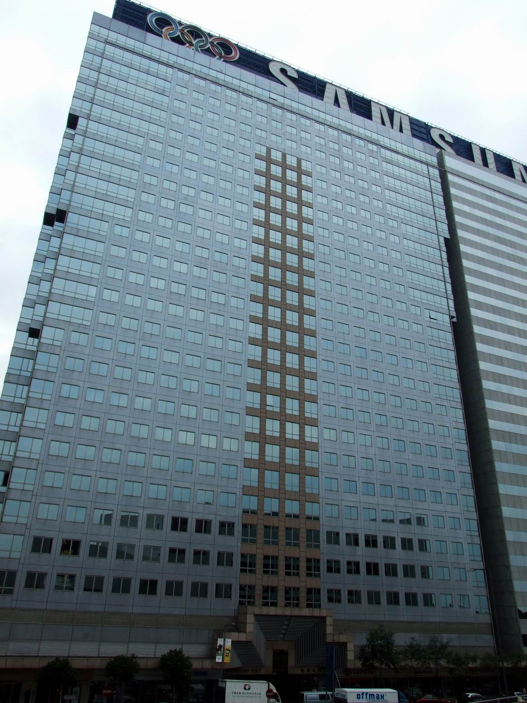 夏愨大廈